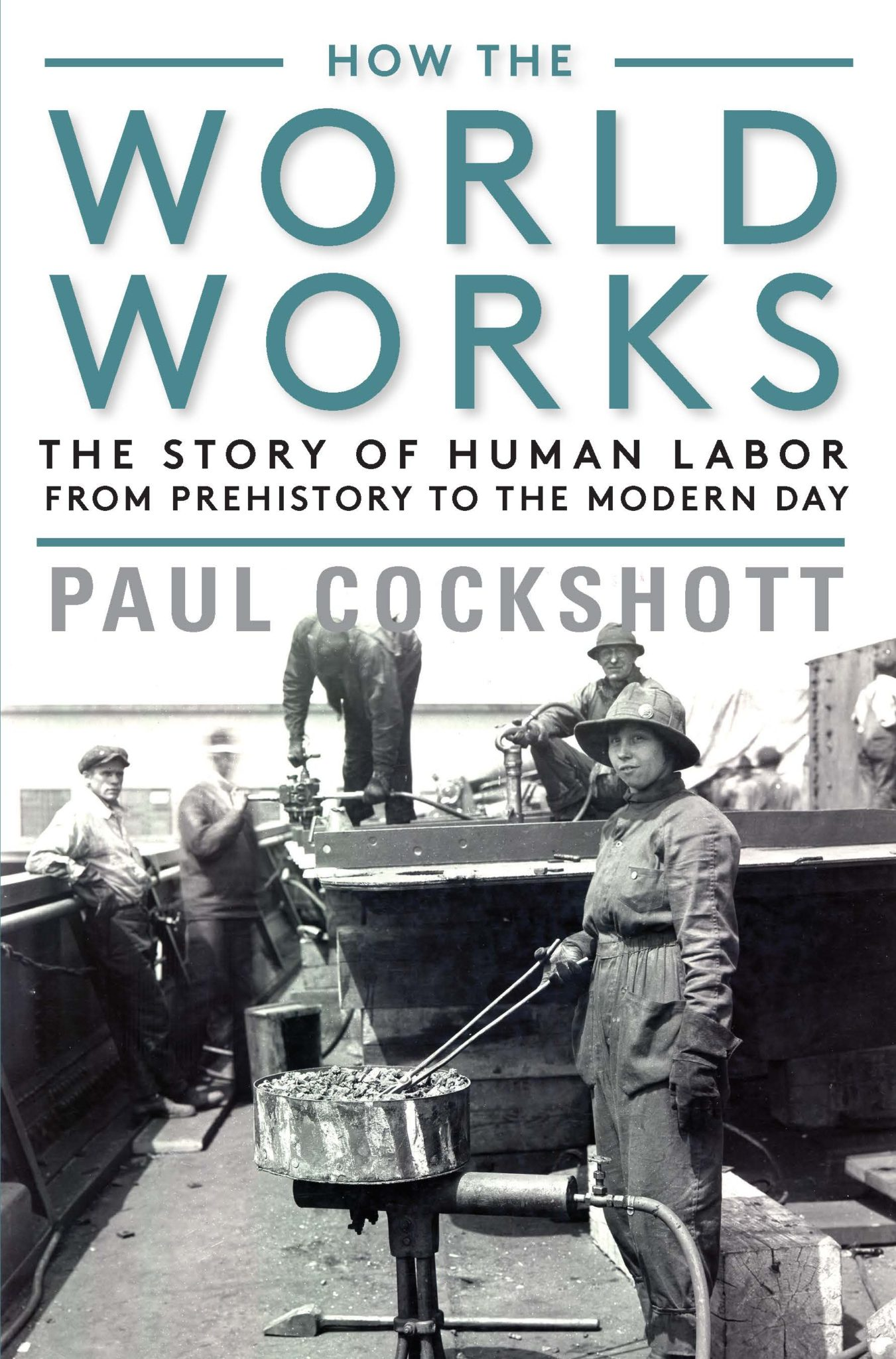 Насловна страница на книгата „Како работи светот: приказна за човечкиот труд од праисторија до модерно време“